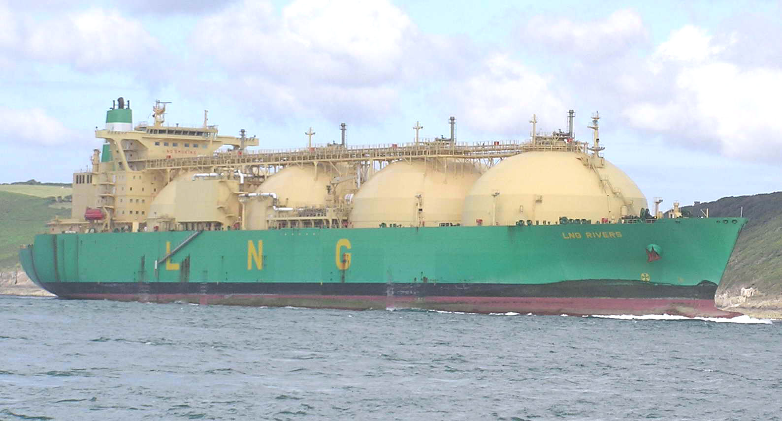 Description : Le LNG RIVERS arrive à Brest pour son premier carénage Lieu : goulet de Brest (Bretagne) Date : Aout 2005 Auteur : Pline Photo personnelle